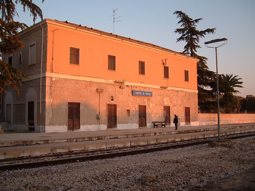 Fabbricato viaggiatori della stazione di Canosa di Puglia, lato binari, nel 2007